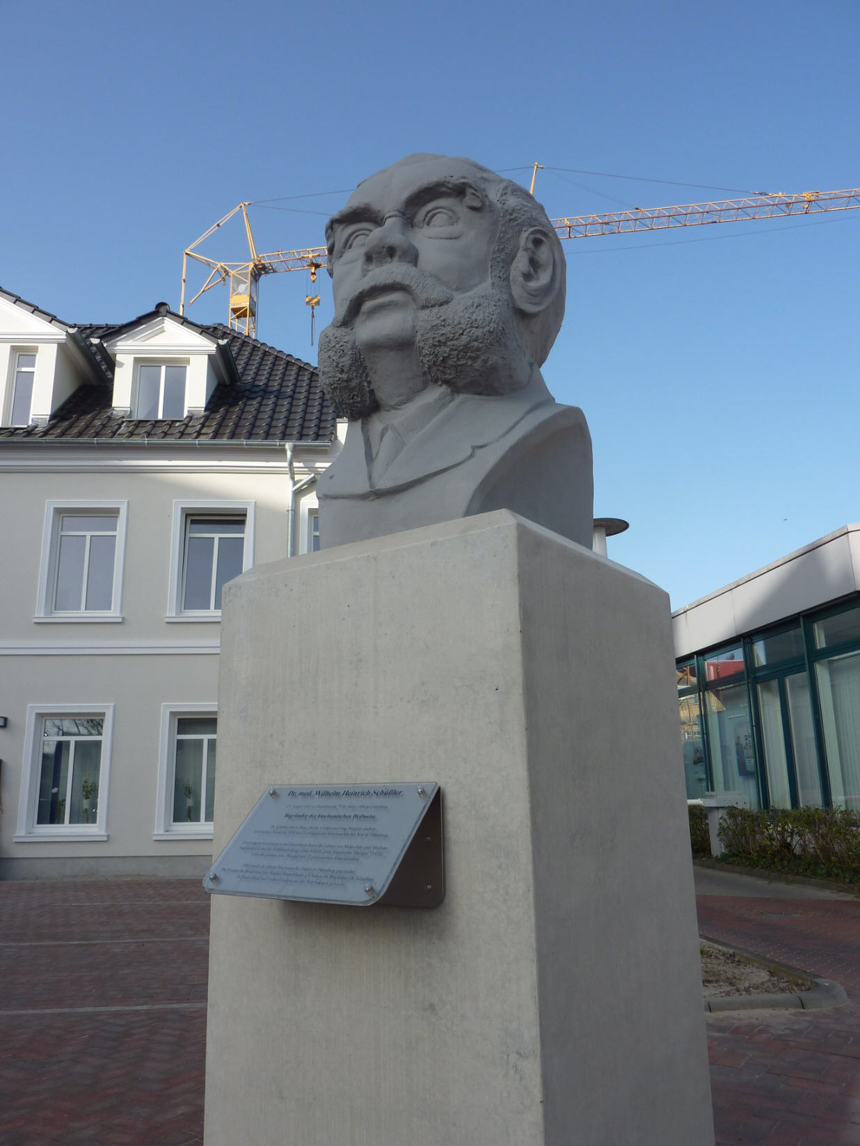 Schüßlerbüste in Bad Zwischenahn